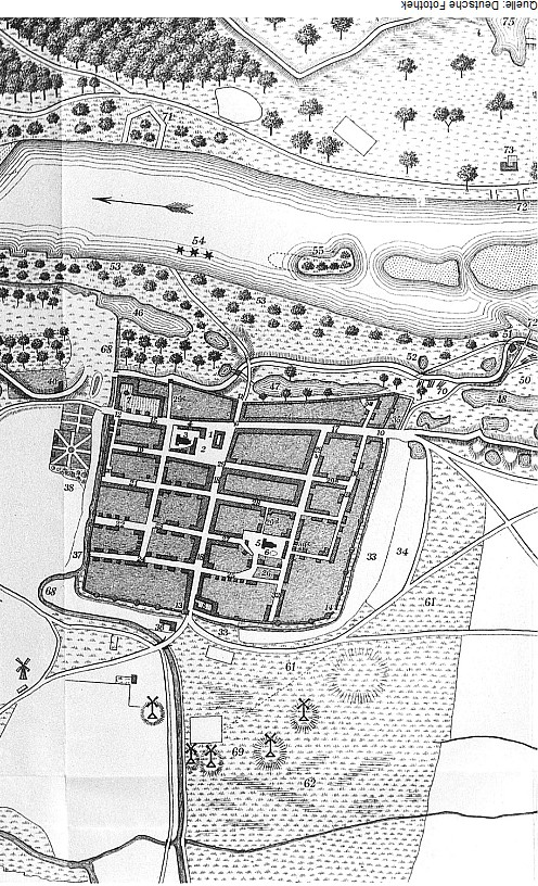 Original image description from the Deutsche Fotothek Aken (Elbe). Lageplan, aus: Geschichtsblätter für Stadt und Land Magdeburg, 36. Jg., 1901